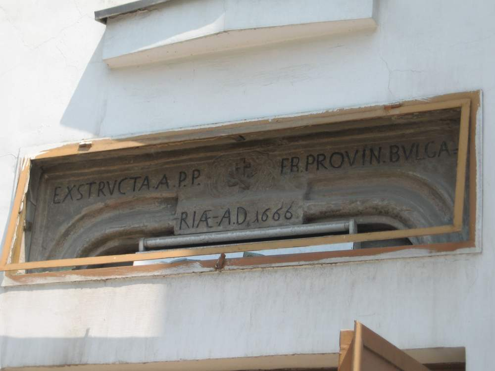 Inscripṭie de la Bǎrǎṭia din Bucureşti.